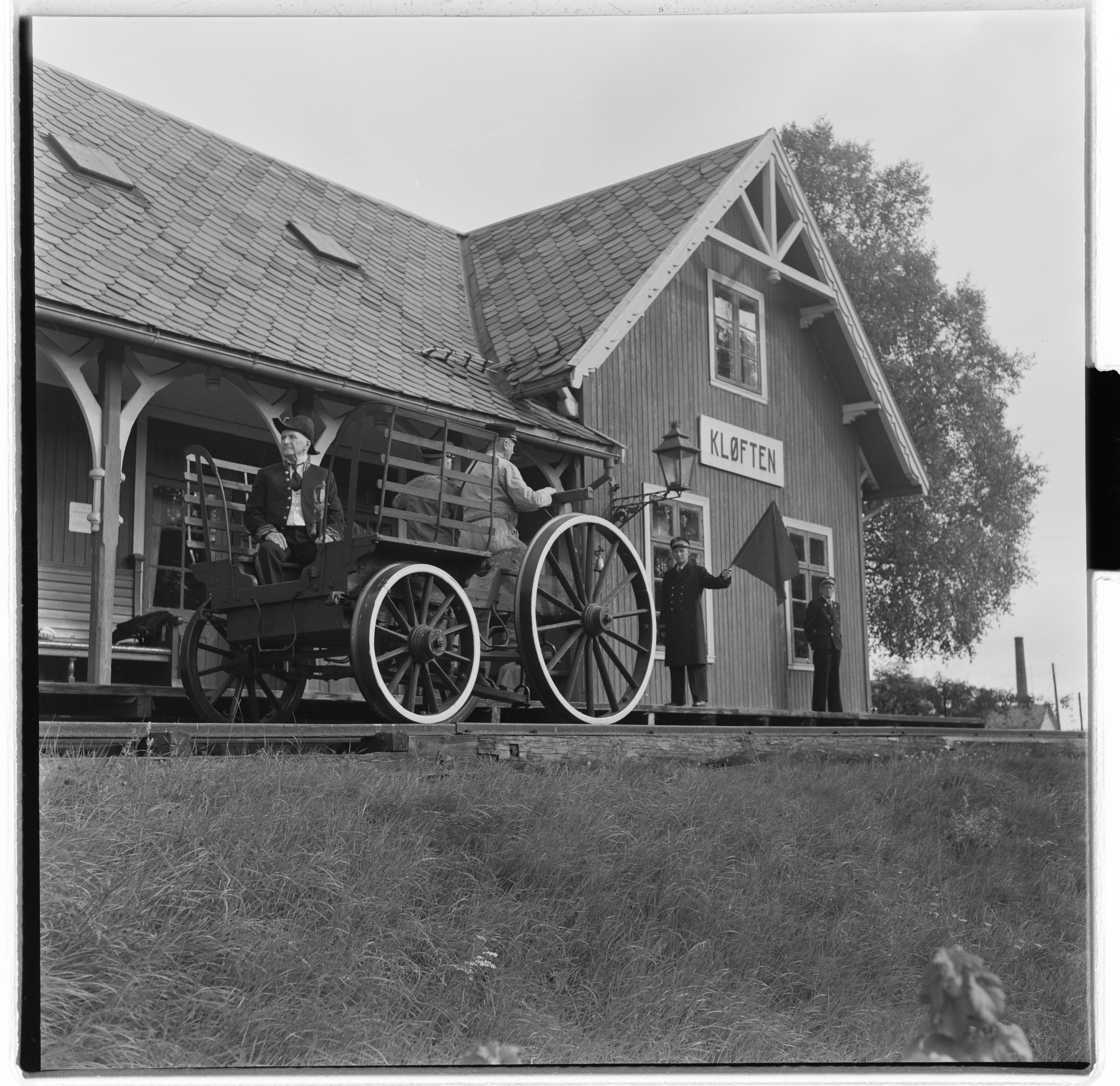 Bildet er hentet fra Arkivverket. Jernbanemuseet, Hamar. NÅ nr. 19 Arkivinstitusjon : Riksarkivet Arkivnavn : Billedbladet NÅ Sted : Norge, Hedmark, Hamar, Jernbanemuseet Emneord: Norsk Jernbanemuseum, Kløfta stasjon, Hamar, Stasjonsbygning, Gammel vogn, Hovedbanen, Kløften stasjon, Jernbanemuseet Avbildet